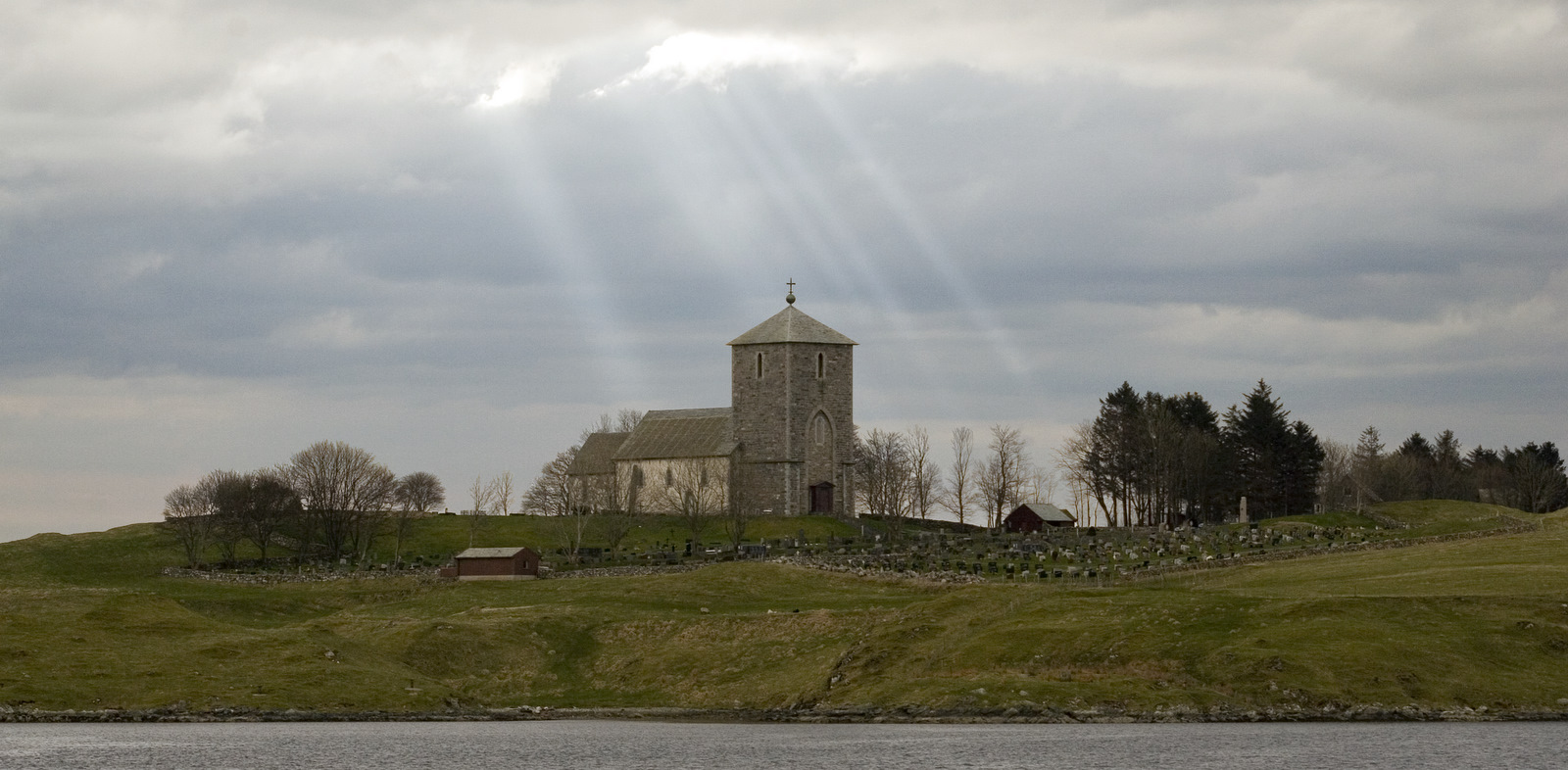 Olavskirken